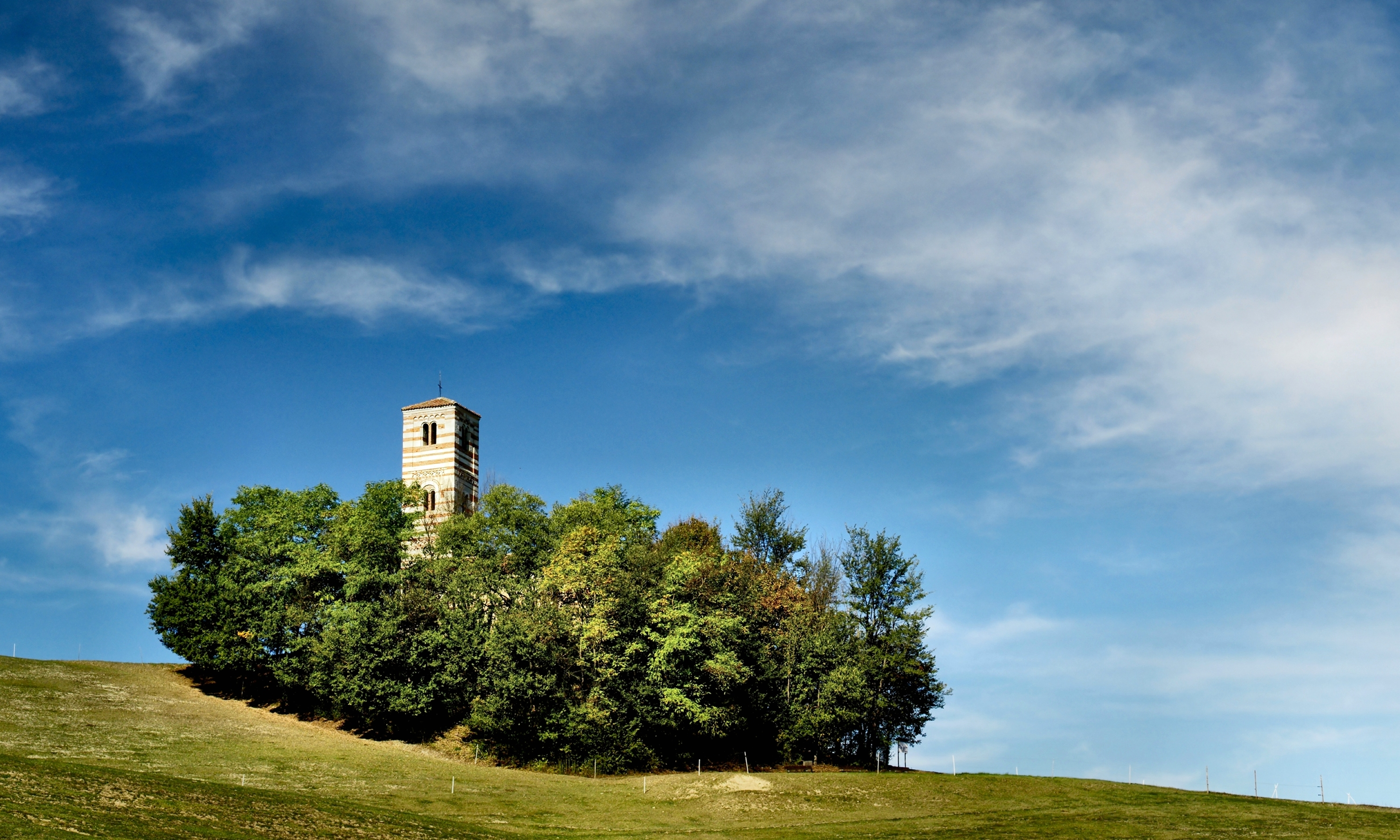 Chiesa dei SS. Nazario e Celso This is a photo of a monument which is part of cultural heritage of Italy.